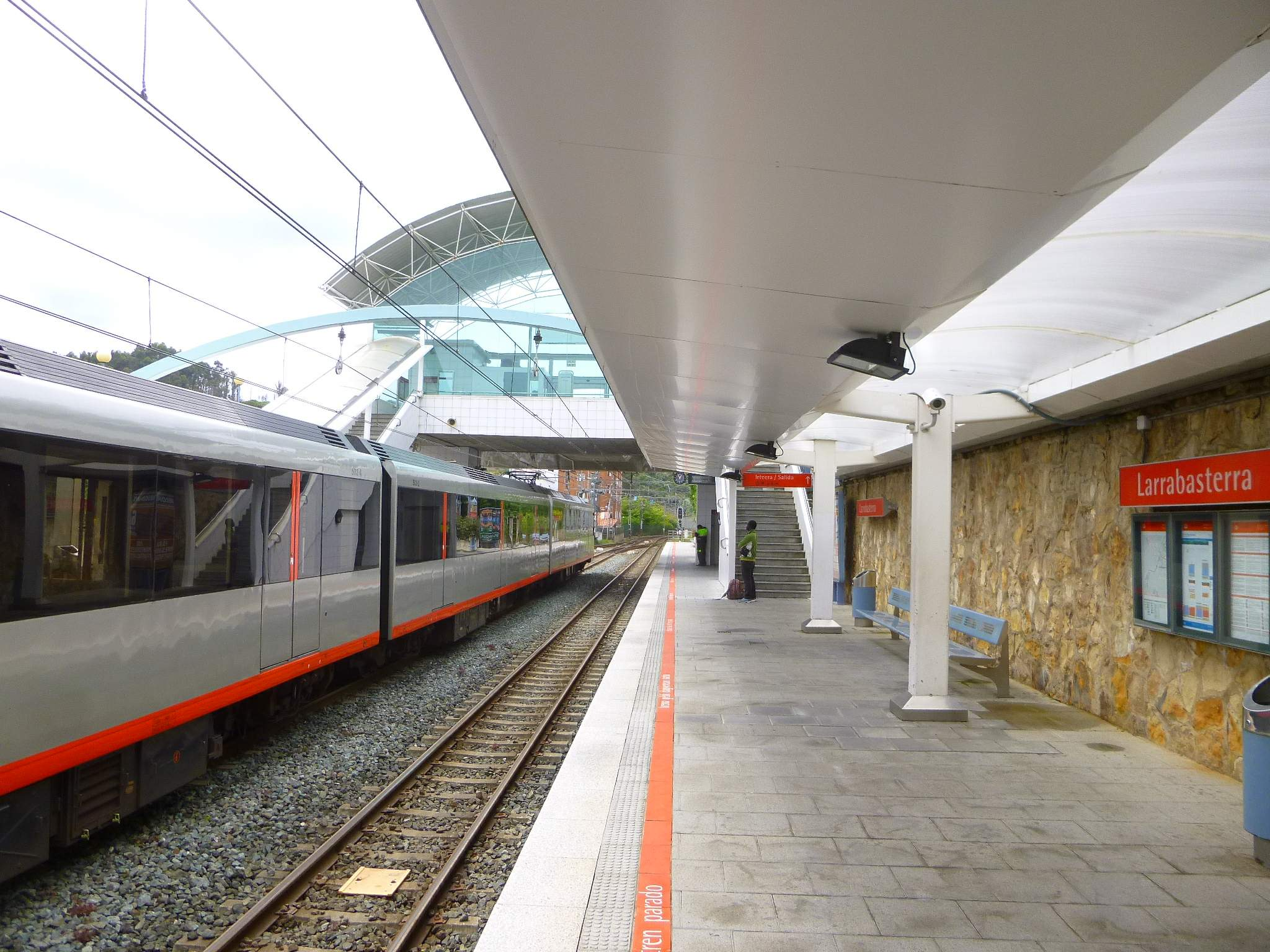 Sopelana - Estación de Bilbao Metro